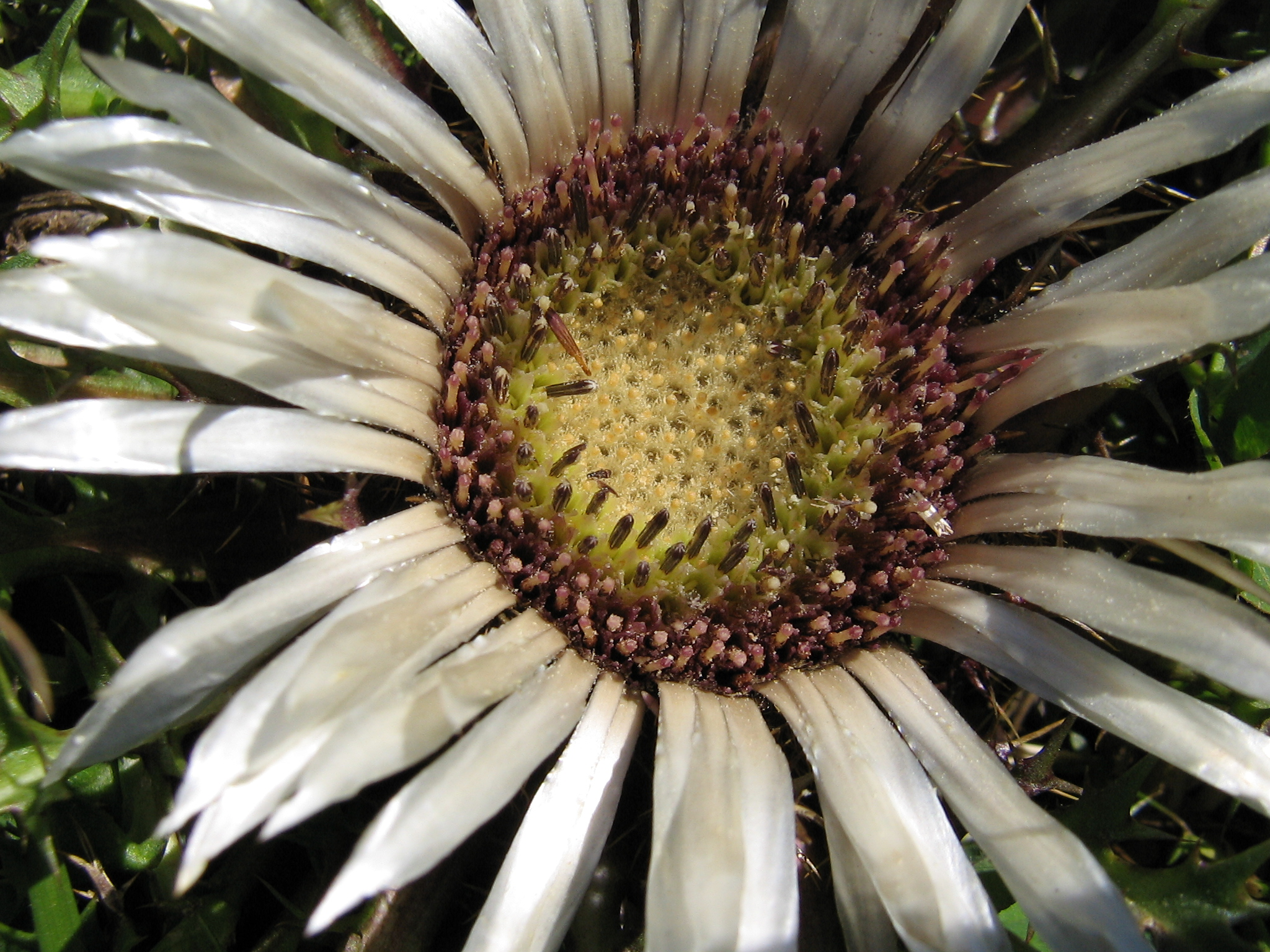 Carlina acaulis (Silberdistel)